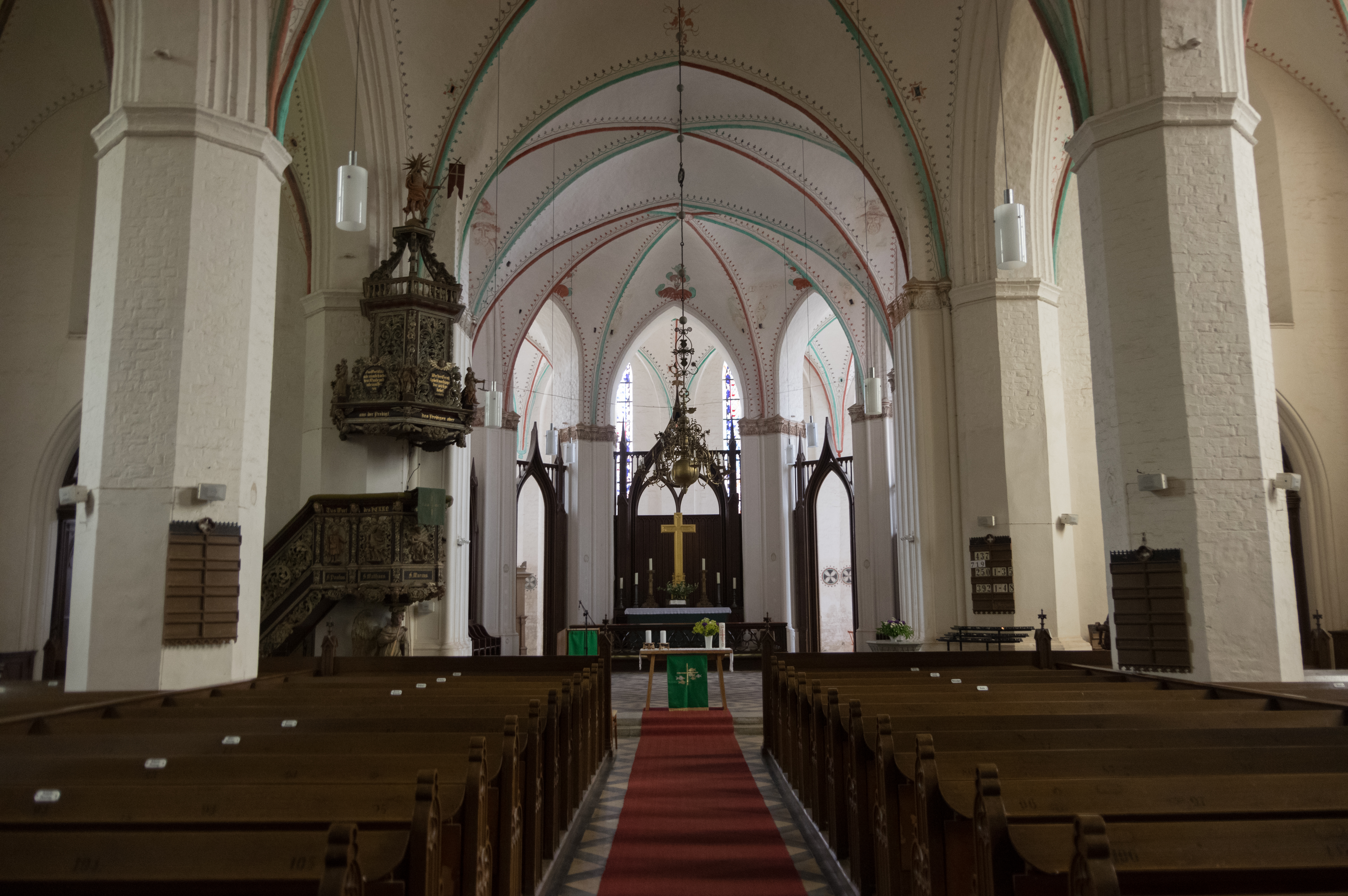 Grimmen in Mecklenburg-Vorpommern. Die Kirche in Grimmen steht unter Denkmalschutz.